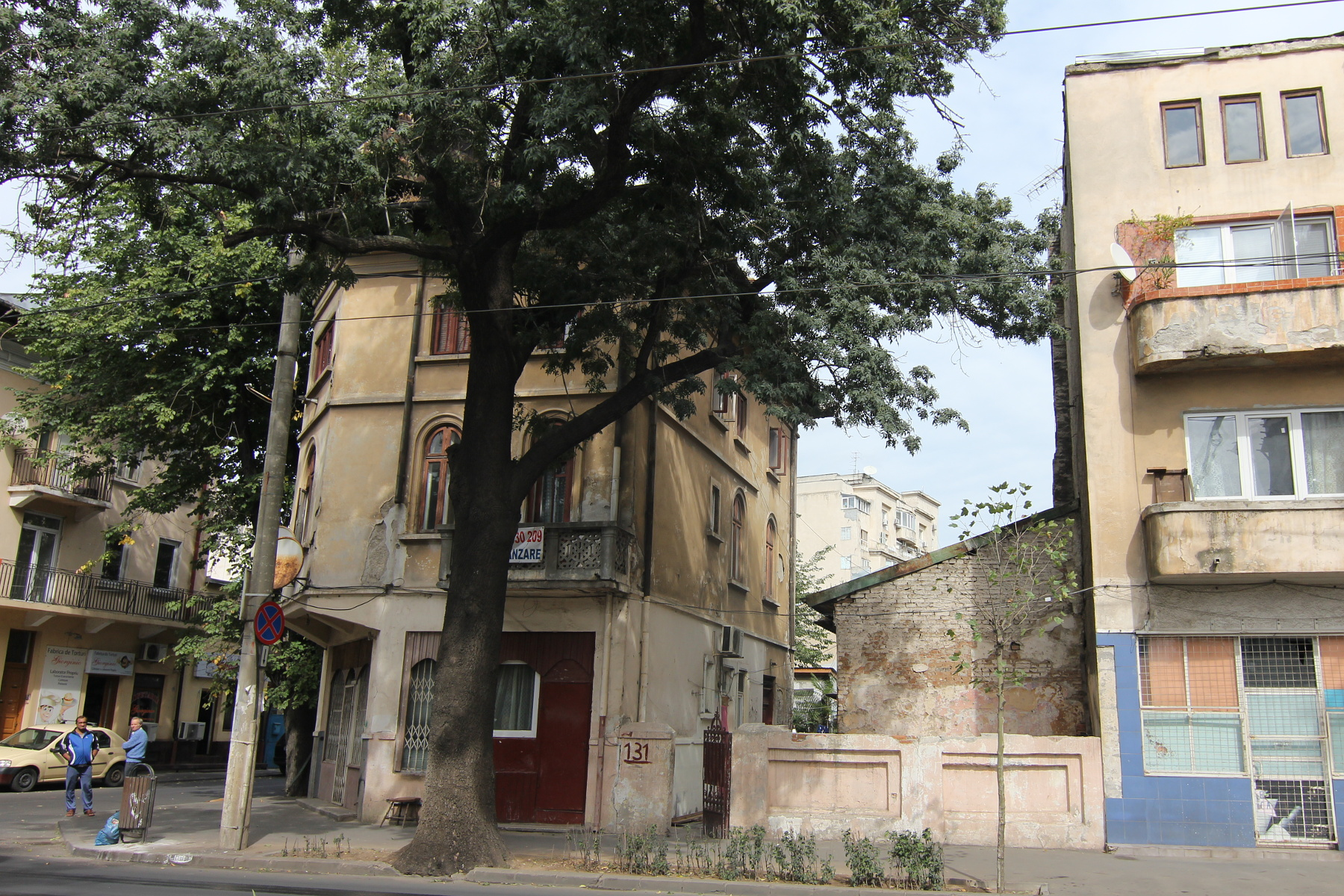 Casă pe Dudești